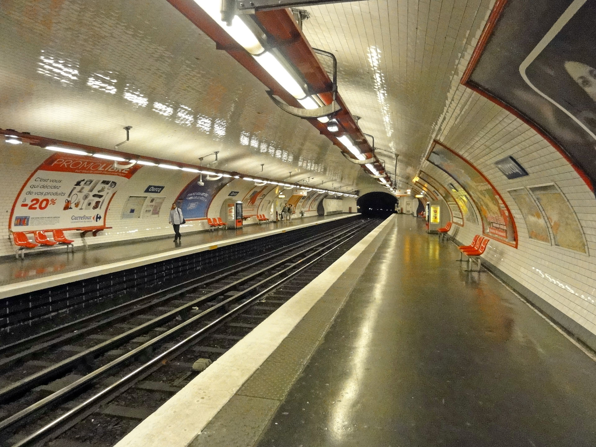 La station Ourcq de la ligne 5 du métro de Paris, France.